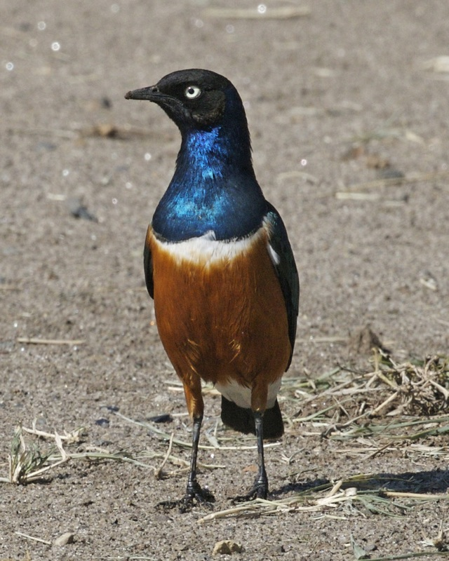 Superb Starling Lamprotornis superbus. Lake Nakuru, Kenya